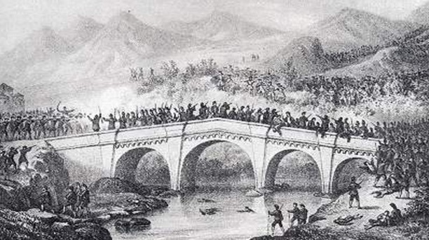 Bataille de Ponte Novu (8 au 9 mai 1769) entre l'armée française du comte de Vaux et les troupes nationalistes corses de Pascal Paoli.